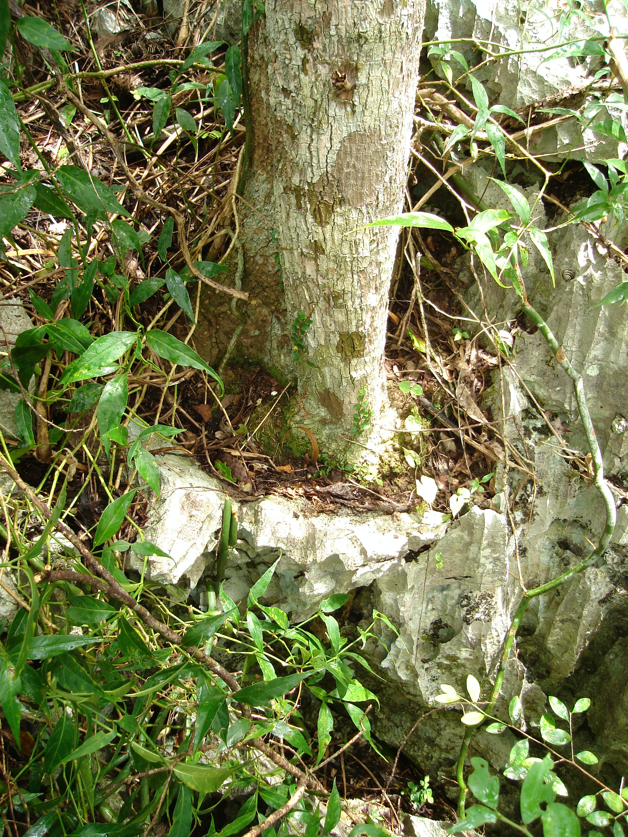 Aralia rex base del árbol, Sierra de la Caoba, Parque Nacional Viñales, Cuba